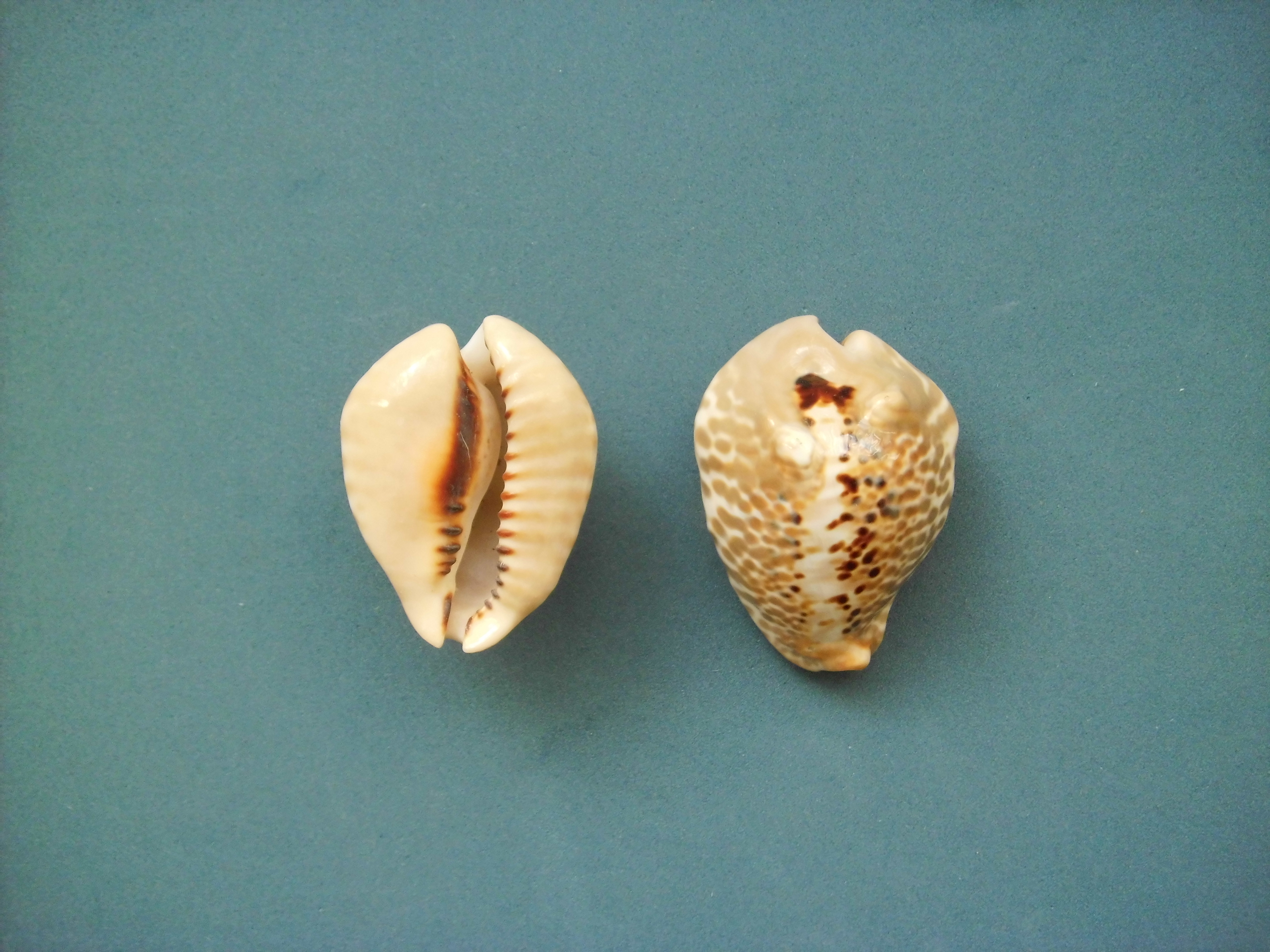 Muracypraea mus bicornis colectada en el 2004 Al note del Cabo San Román, estado Falcón - Venezuela.